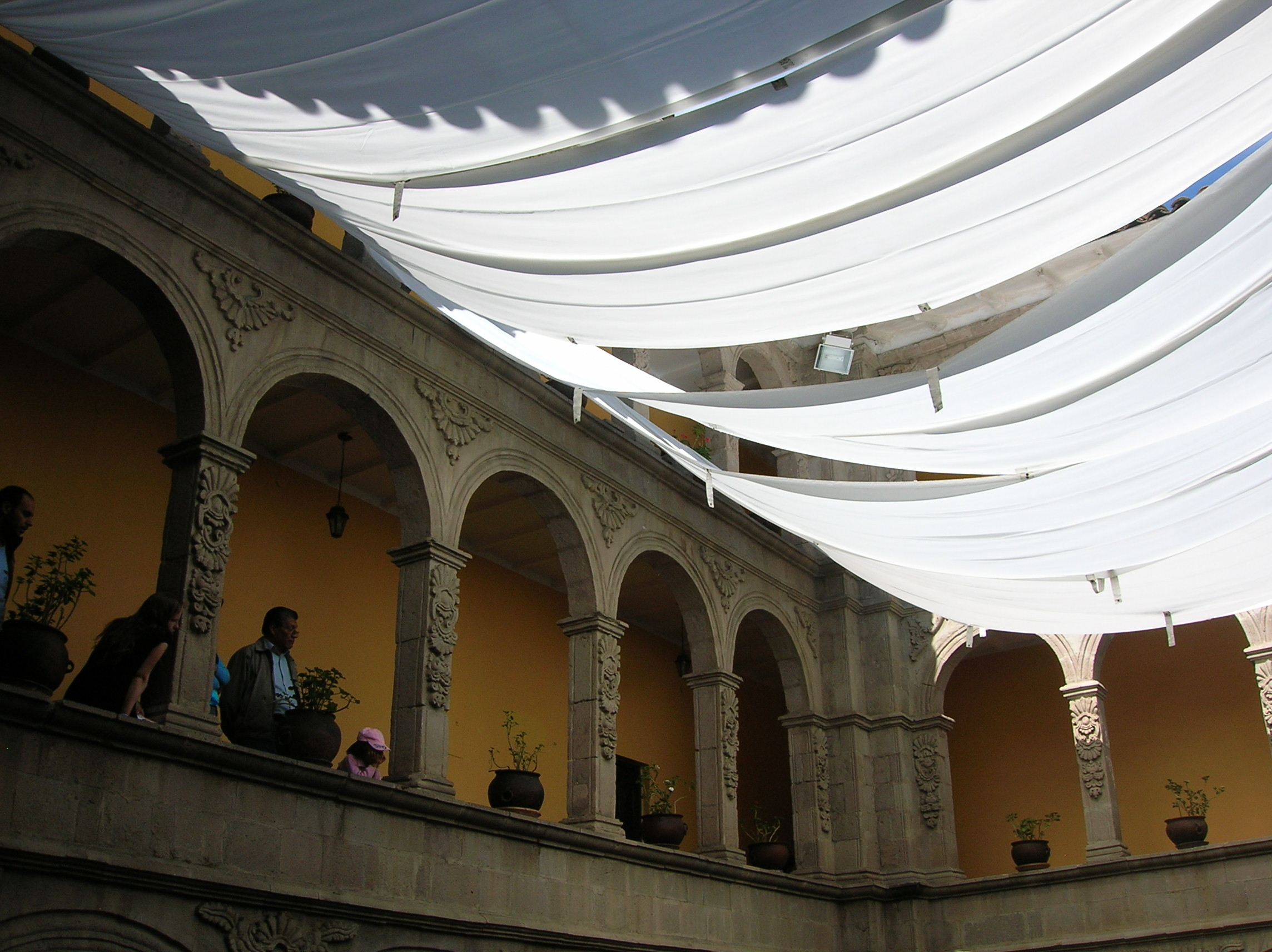 Casa Diez de Medina, Museo Nacional de Arte This medium shows the protected monument with the number L/00-075 in Bolivia.